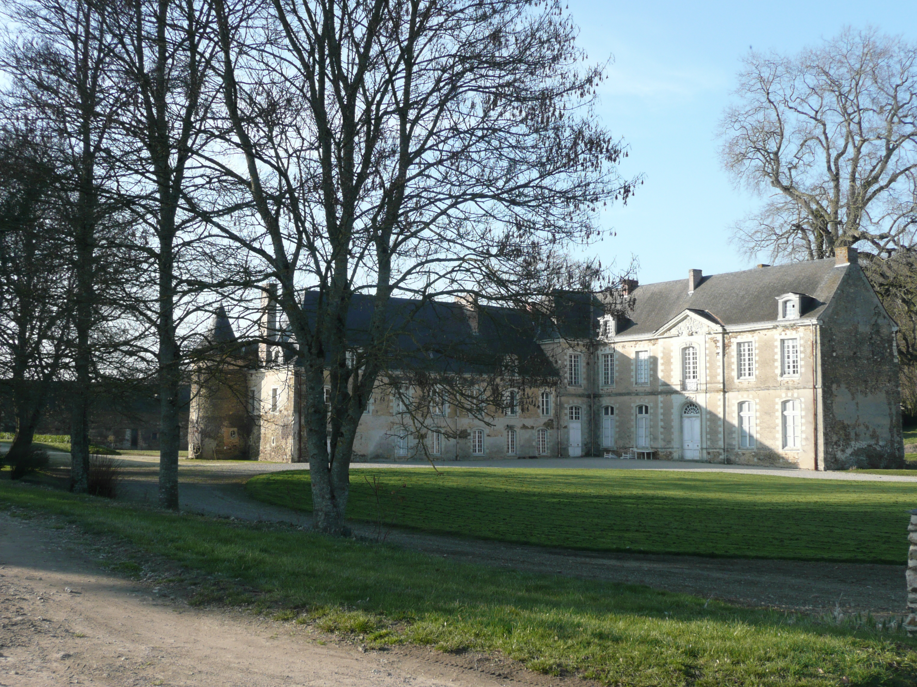 Château de Champiré, MH, Grugé-l'Hopital